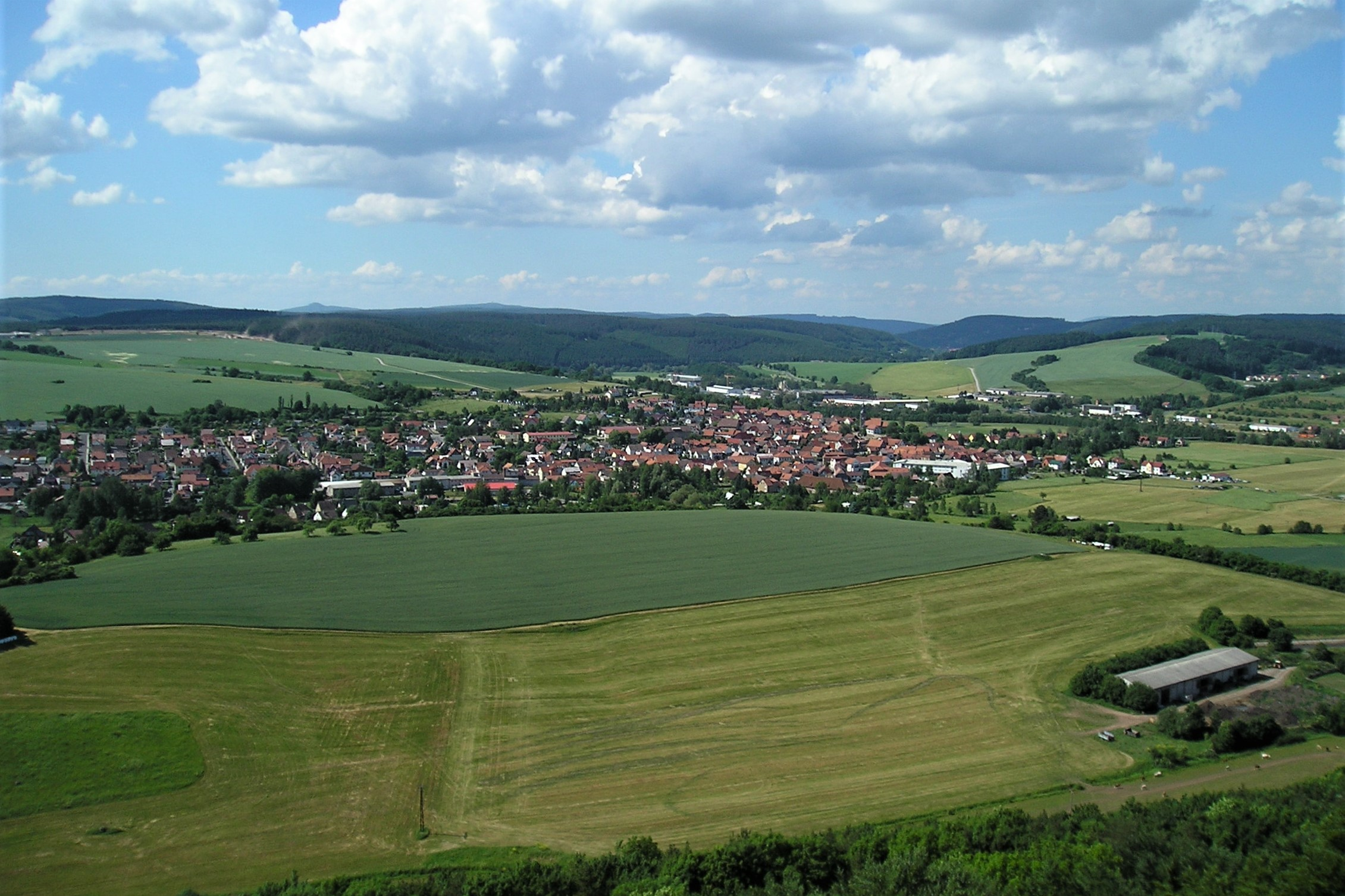 Blick auf Walldorf (Werra)